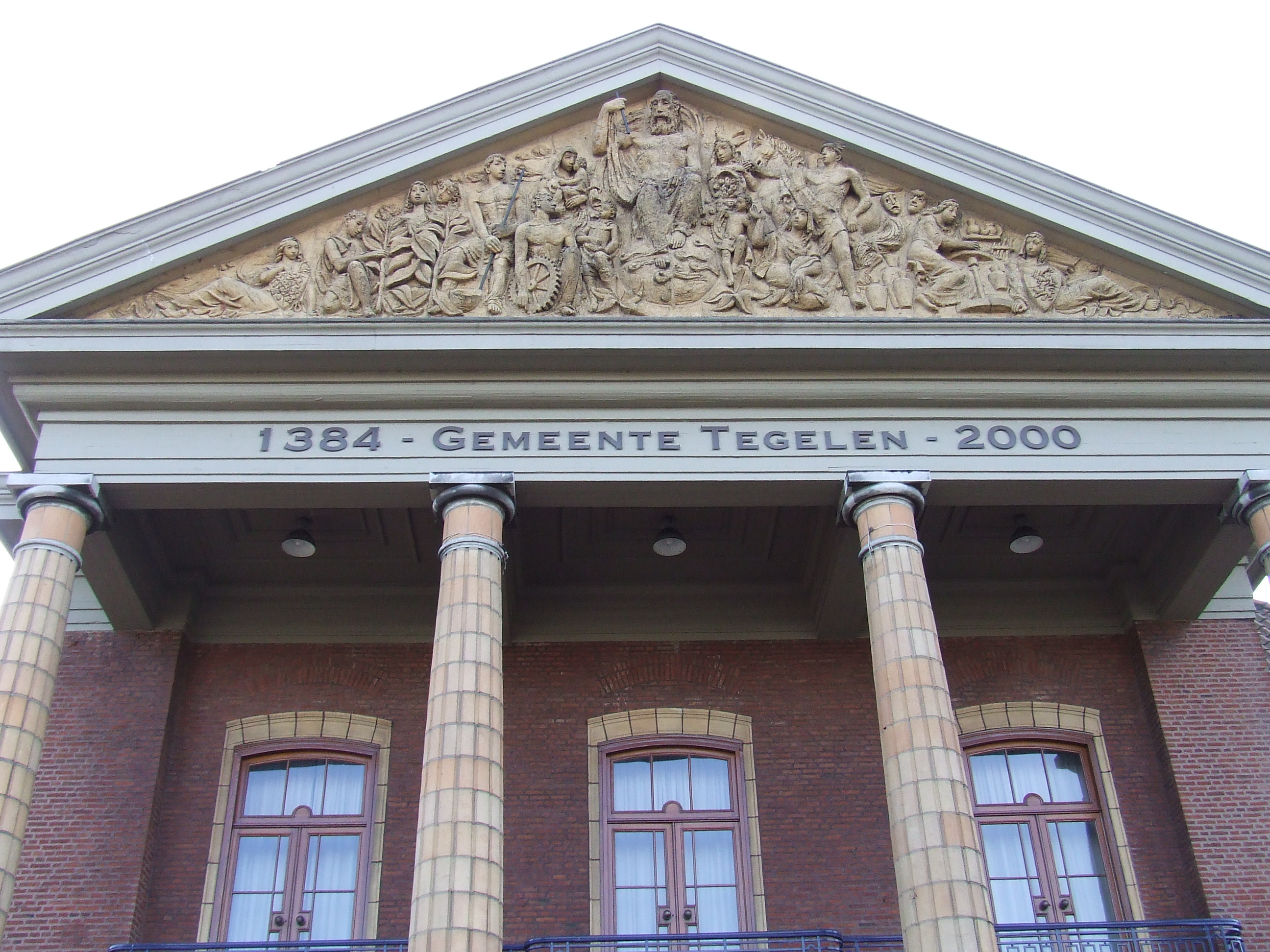 Foto timpaan gemeentehuis Tegelen by Charles Eyck